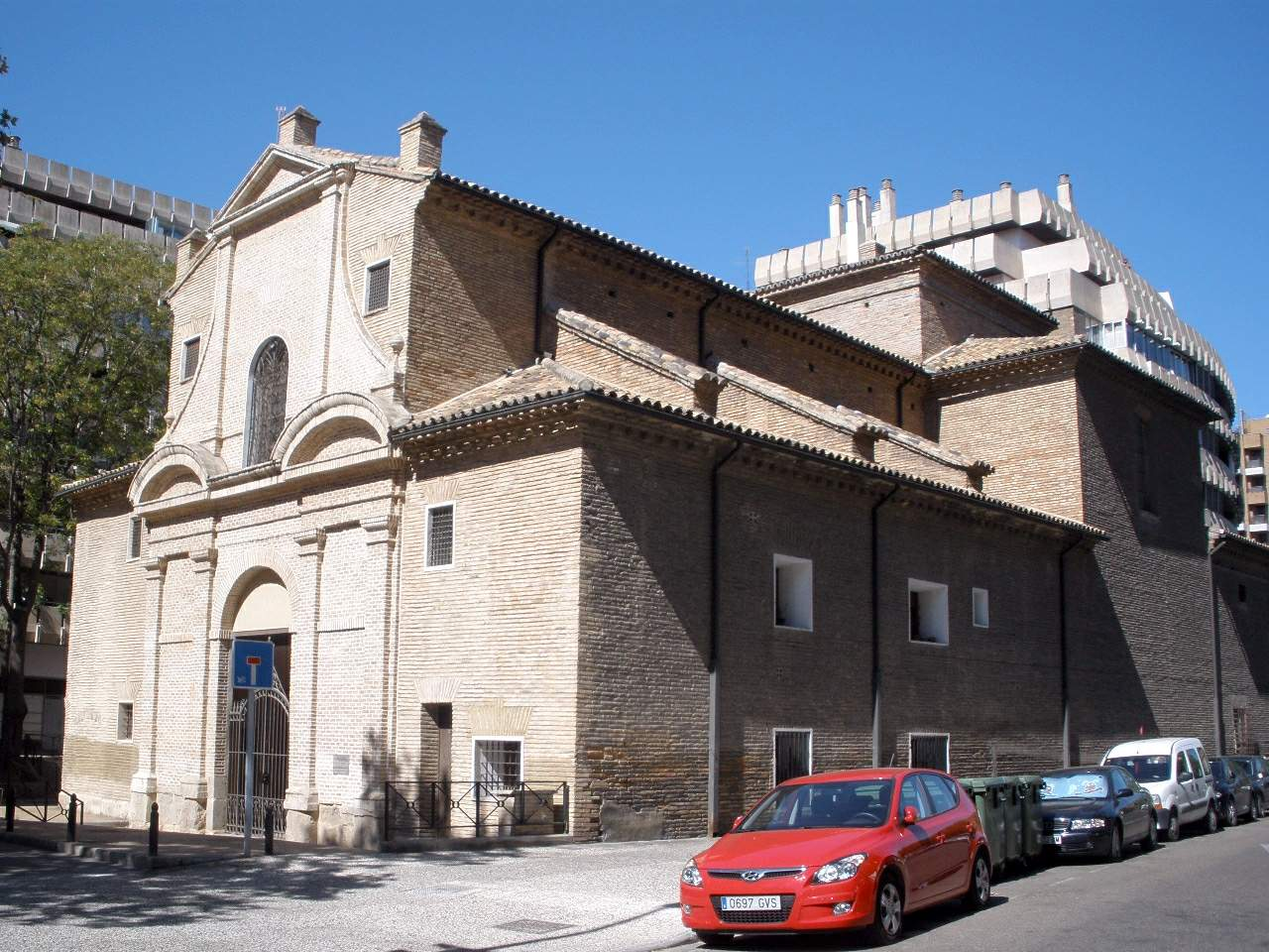 Zaragoza - Iglesia-Convento de Santa Teresa (Fecetas)